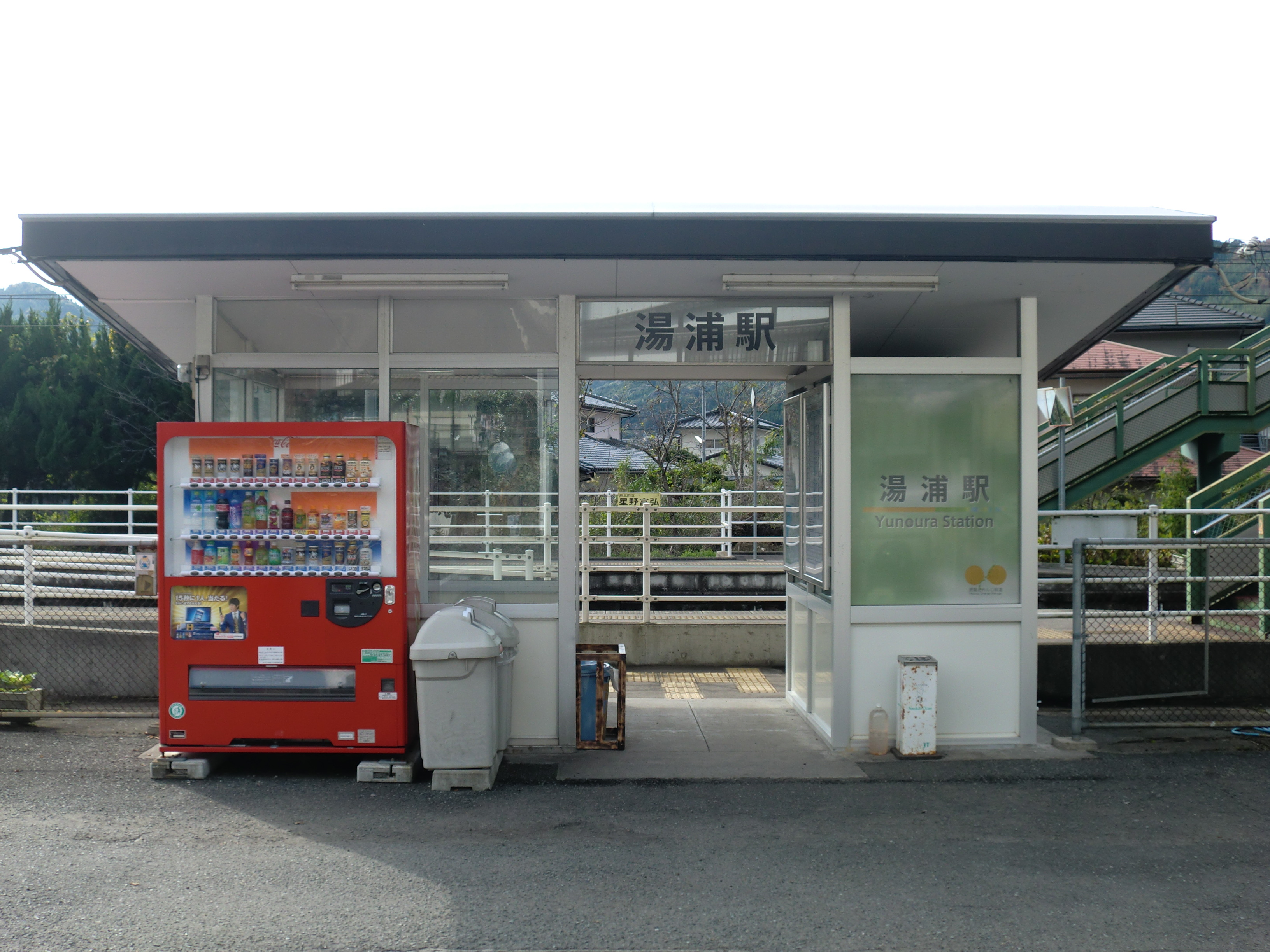 肥薩おれんじ鉄道湯浦（ゆのうら）駅